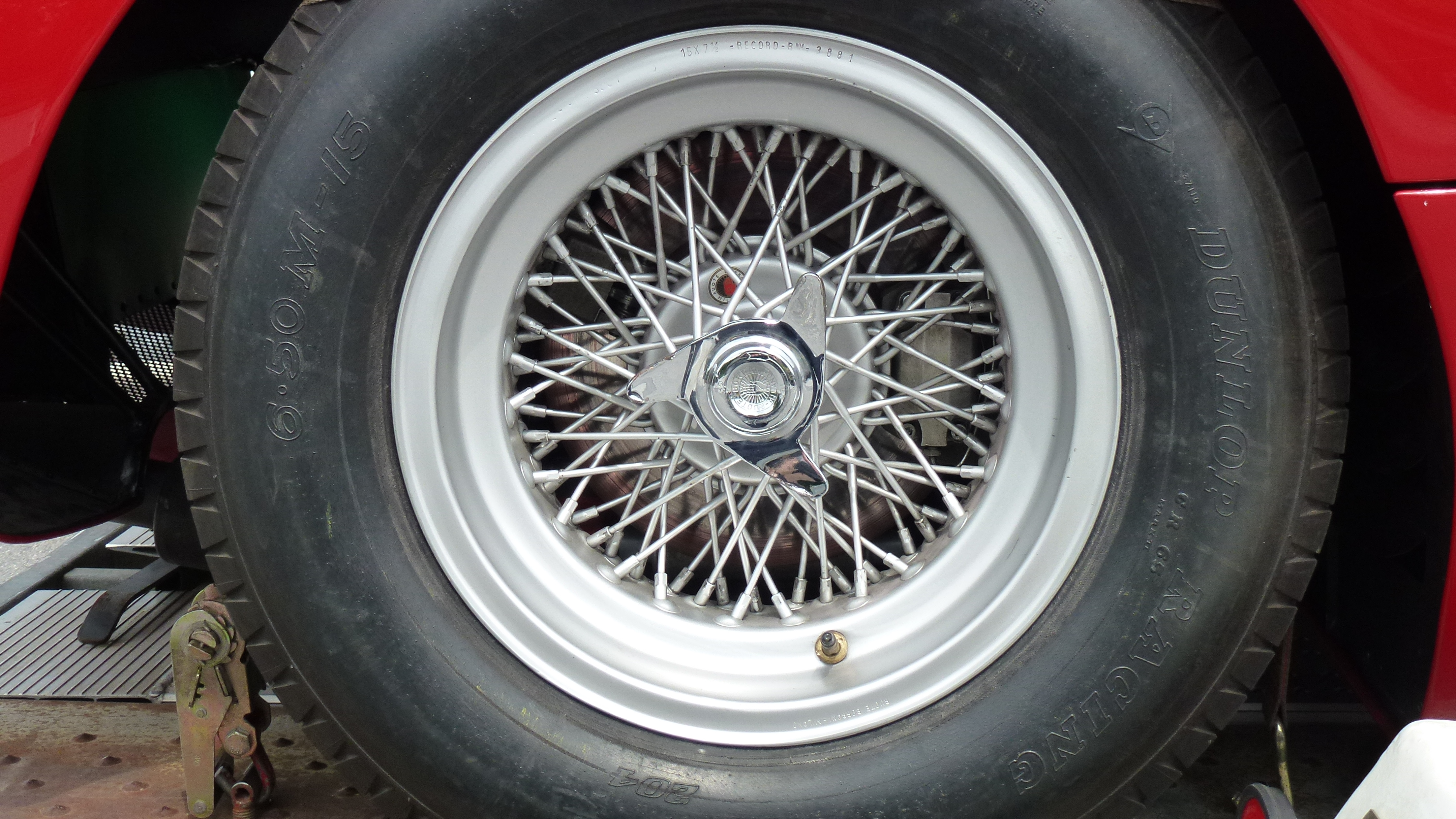 1965 Serenissima - Jante Borrani